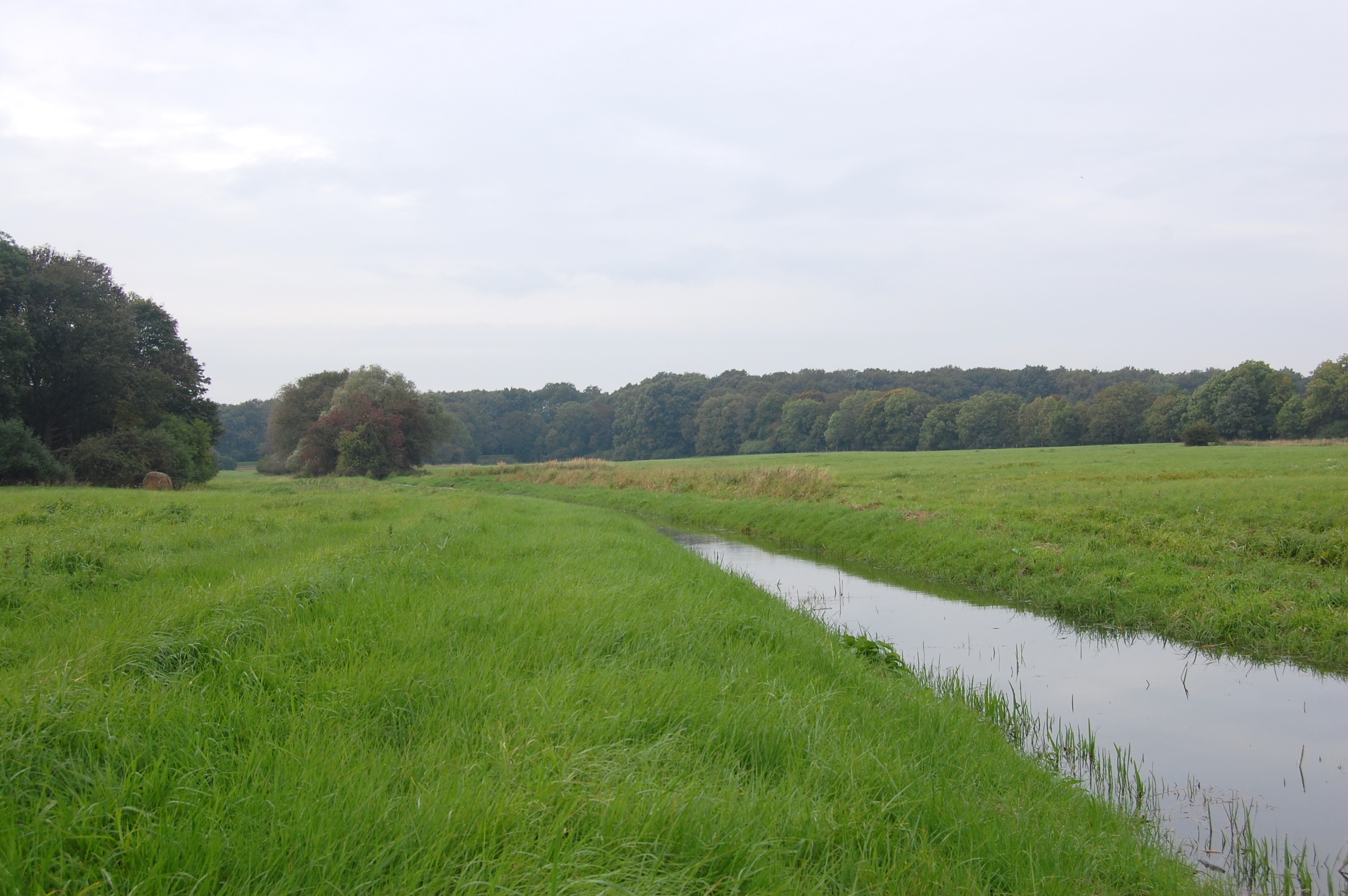 Franzosengraben in der Kreuzhorst, Magdeburg; Bereich im LSG „Mittlere Elbe“ (außerhalb des Naturschutzgebiets)